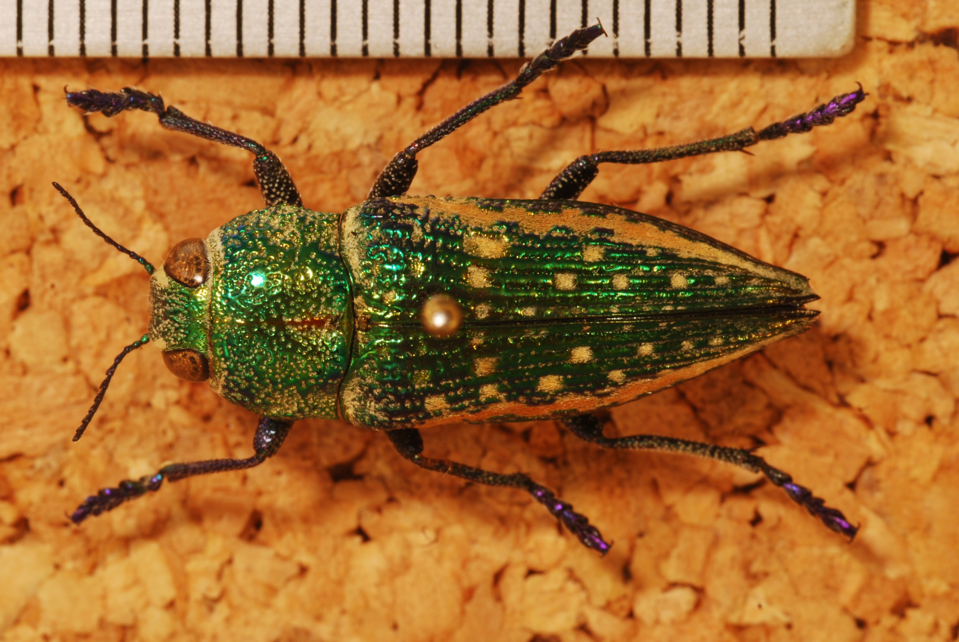 Desaguadero, San Luis, ARGENTINA